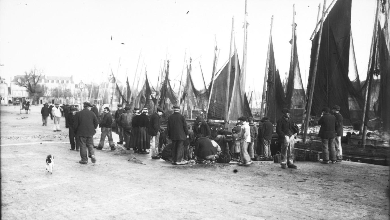 Concarneau : vue du port au retour de pêche (photographie de presse, agence Rol, 1913)